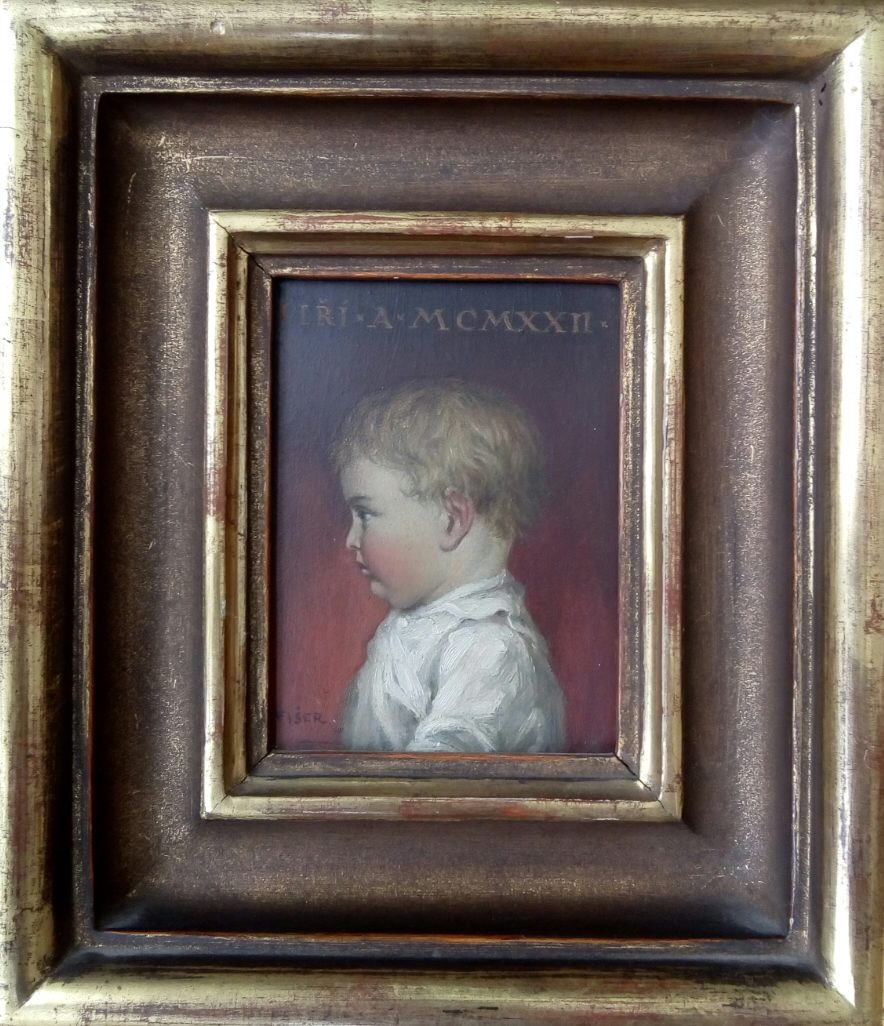 Syn Jirka